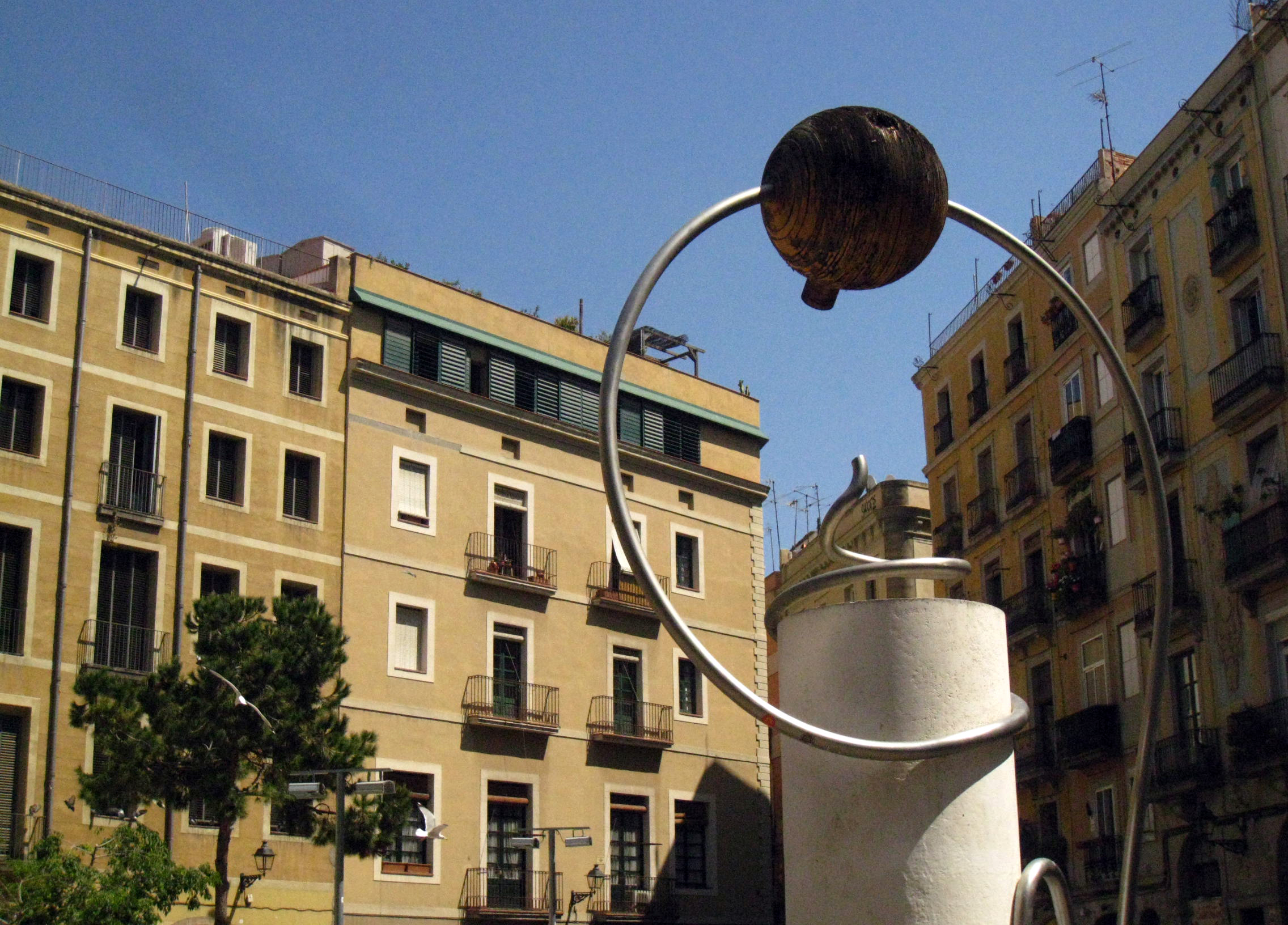 Monument (Leandre Cristòfol). Pl. George Orwell (Barcelona)